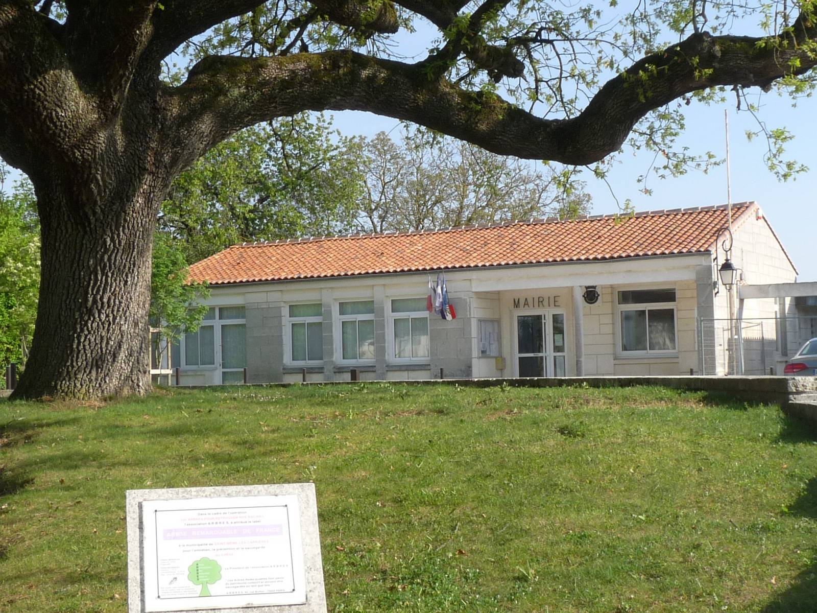 Chêne et mairie de Saint-Même-les-Carrières (16), France